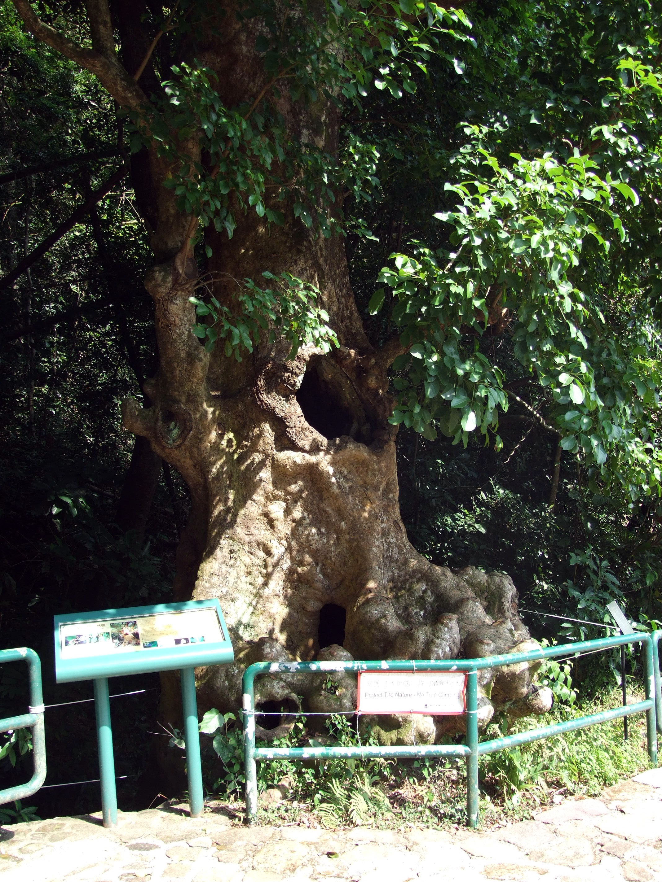 中文（香港）: 空心樹